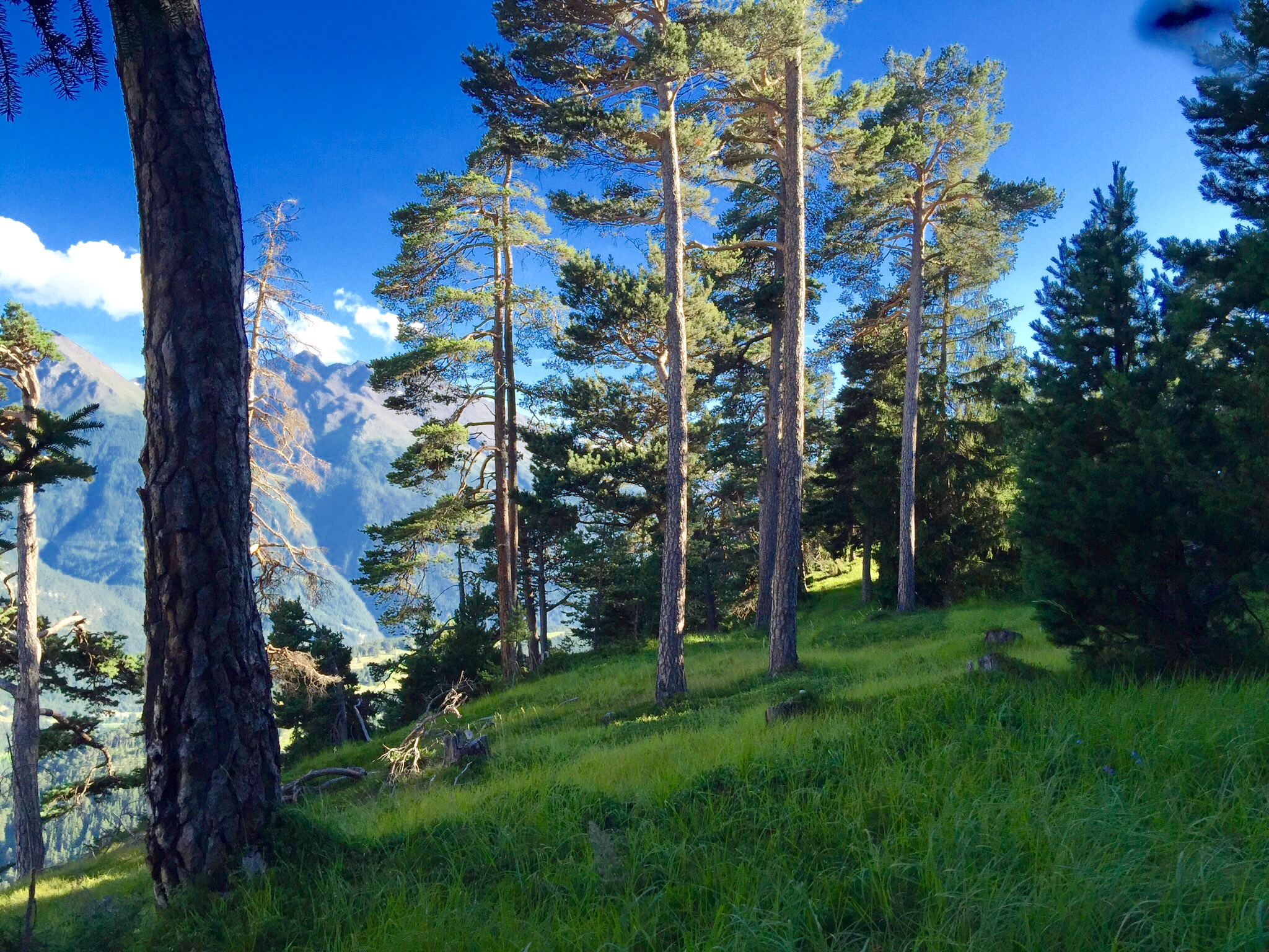 Formations forestières et herbacées des alpes internes à 1750 mètres d'altitude, site natura 2000 de Sollières-Sardières